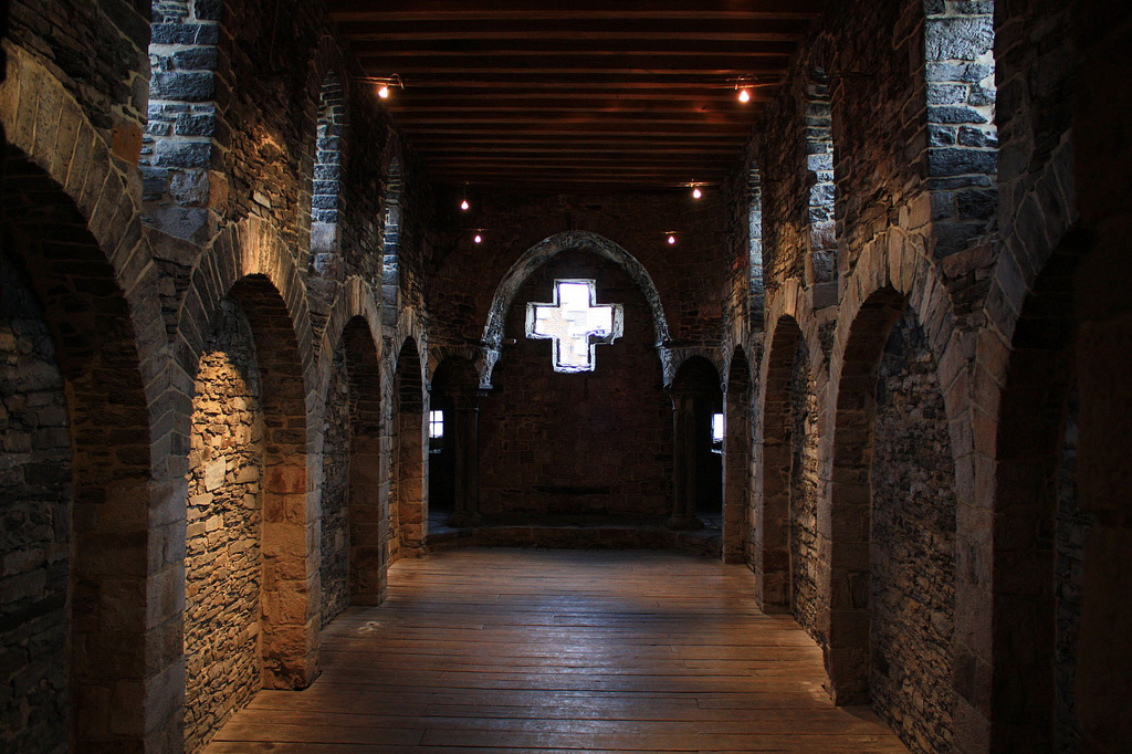 de voormalige kapel van het Gravensteen te Gent